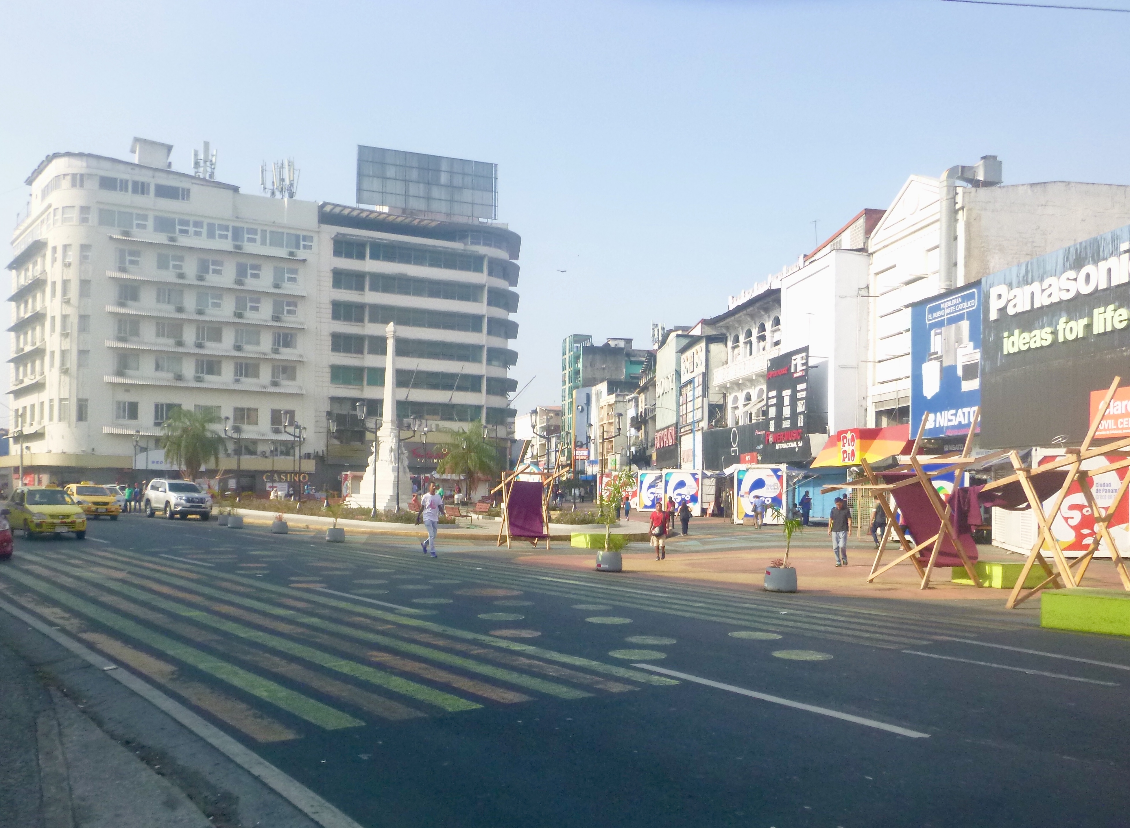 Foto de la Plaza 5 de Mayo